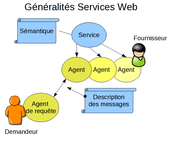 Les services web d'après